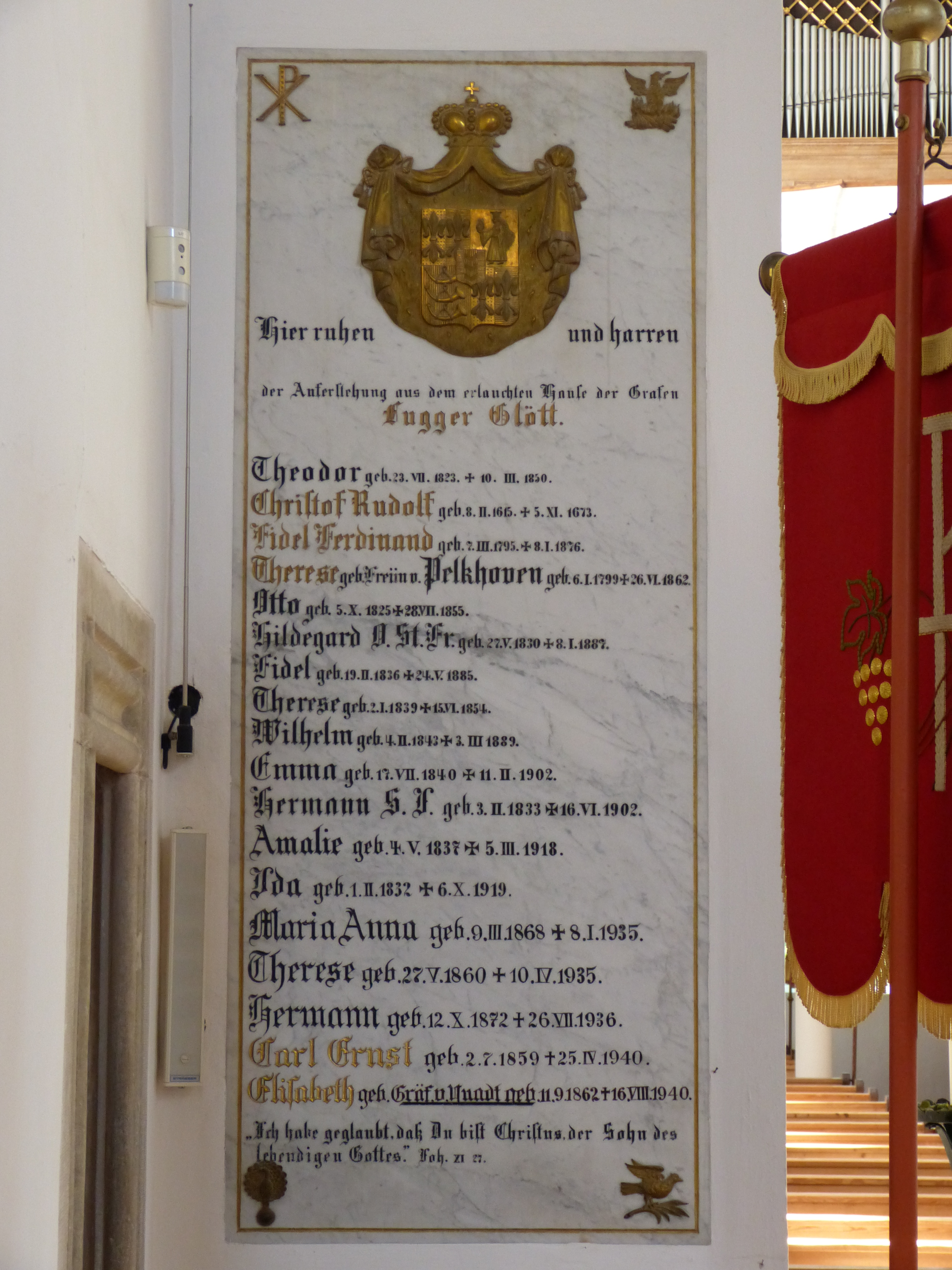 St. Peter und Paul, Kirchheim in Schwaben, Landkreis Unterallgäu, Bayern